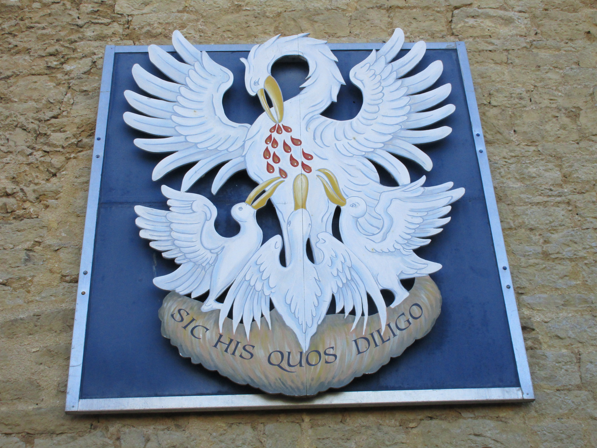 Armoiries d'Arbois, au dessus de la porte d'entrée du Château Pécauld d'Arbois